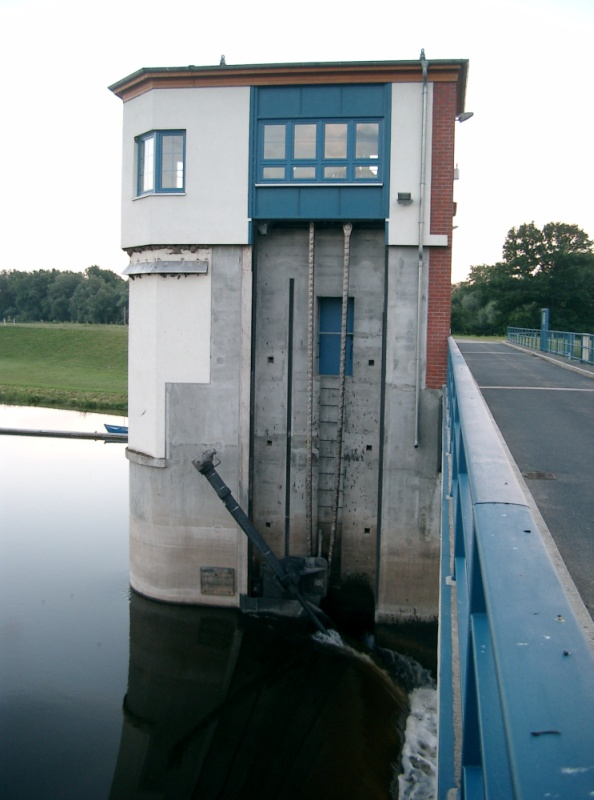 Wehr Gnevsdorf im Gnevsdorfer Vorfluter (Detailaufnahme)